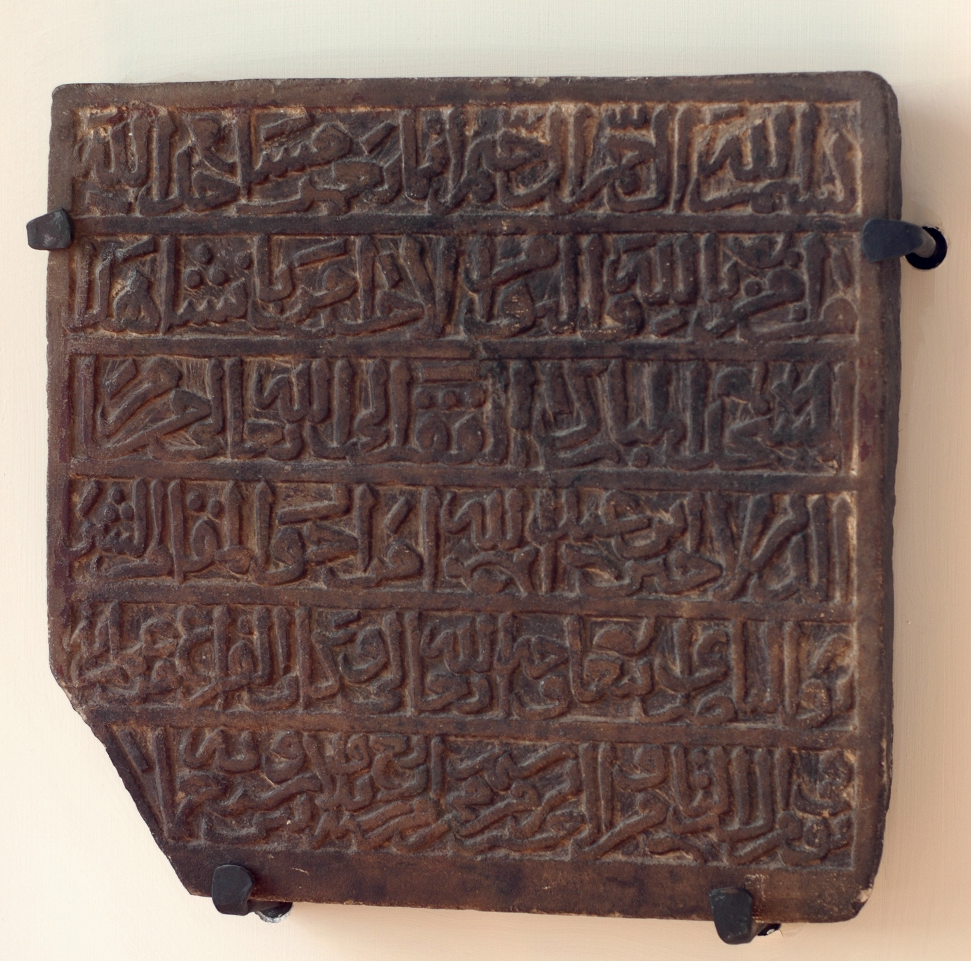 Stèle de fondation de mosquée Marbre sculpté et peint, inscription en écriture cursive, Égypte ou Syrie, 1354.